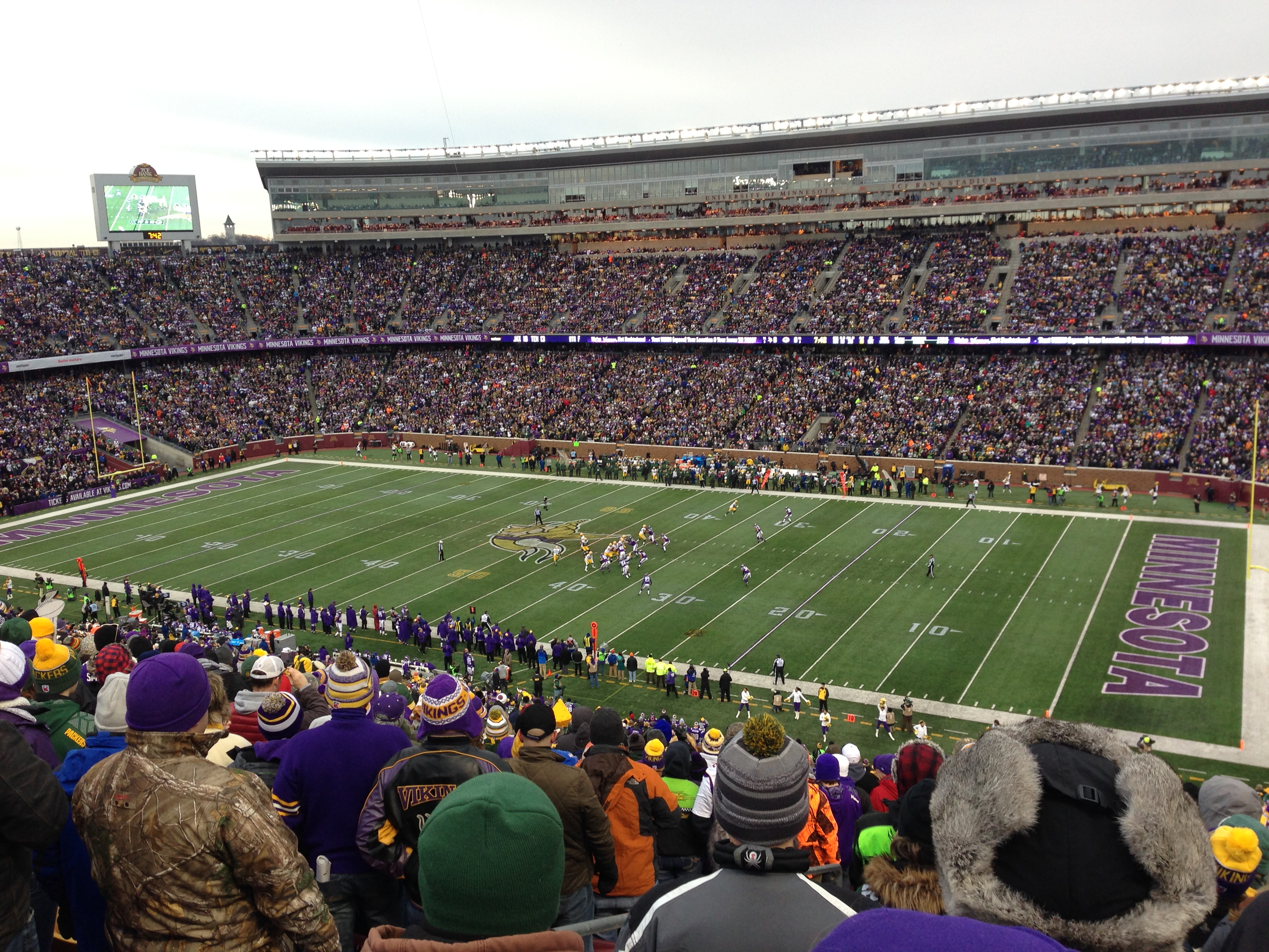 TCF Bank Stadium, Minneapolis, Minnesota